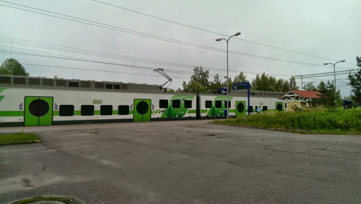 Ryttylän asema